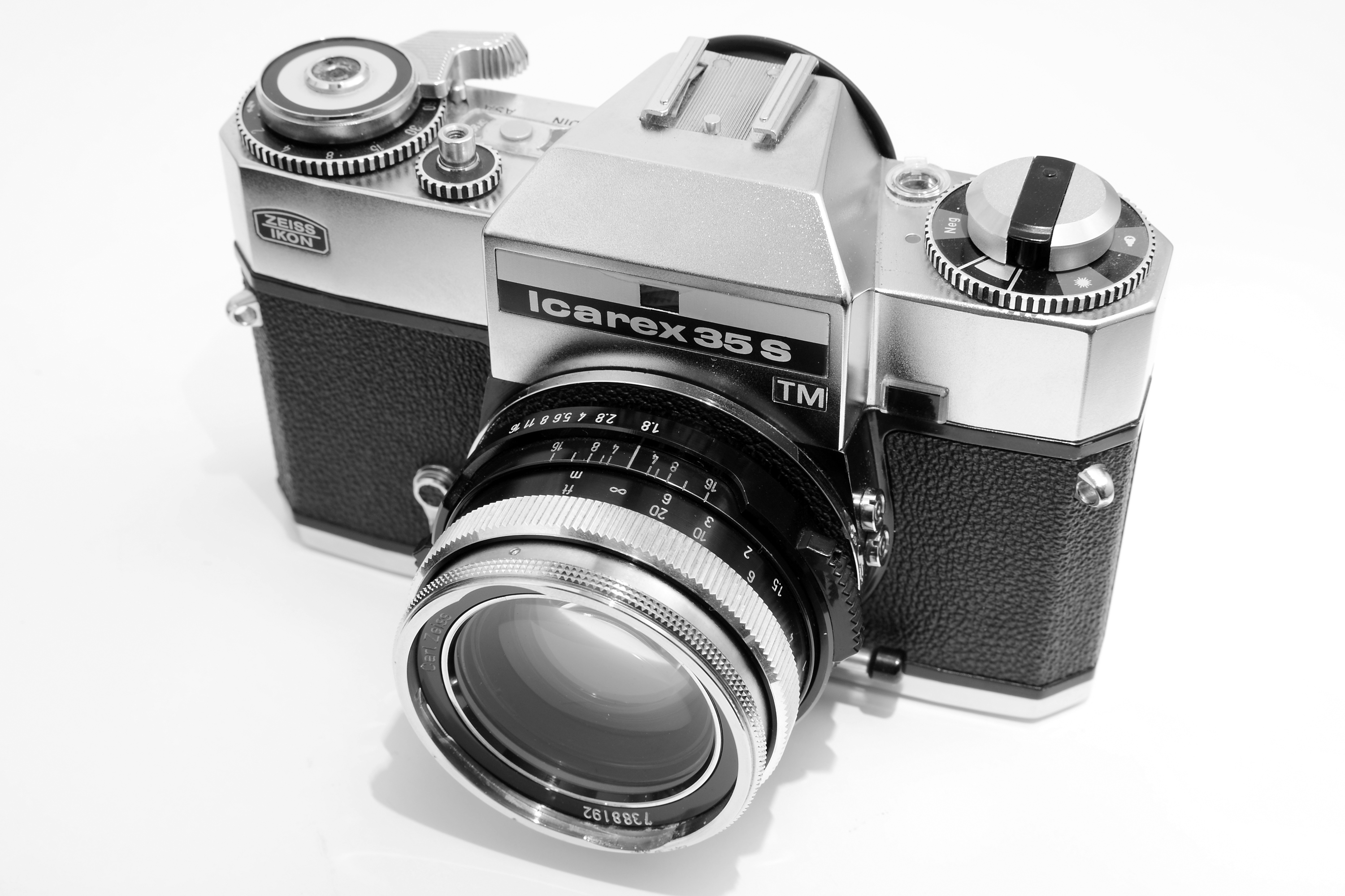 Zeiss Ikon Icarex 35S TM, mit Ultron 50 mm 1.8